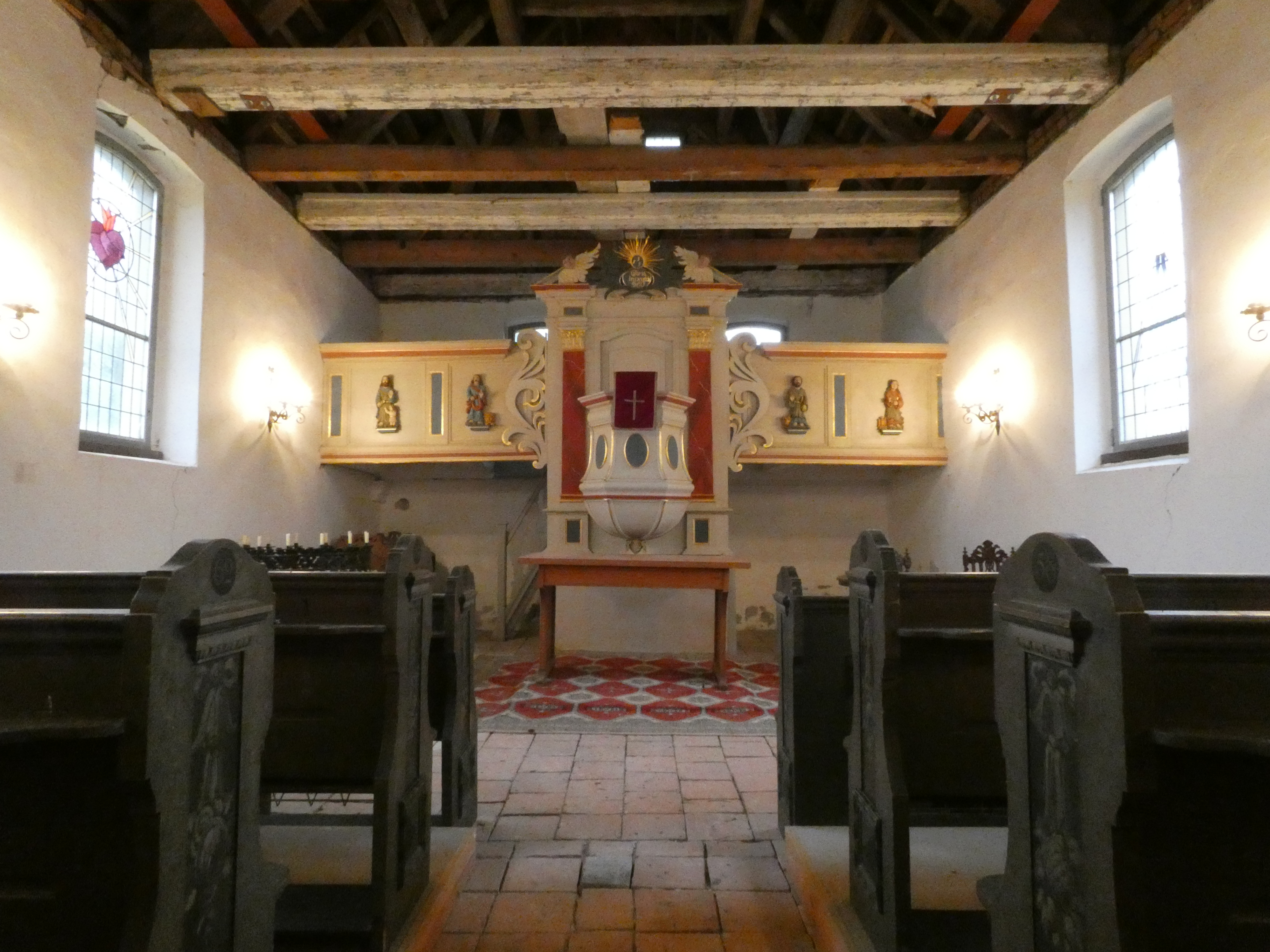 Dorfkirche Riewend innen